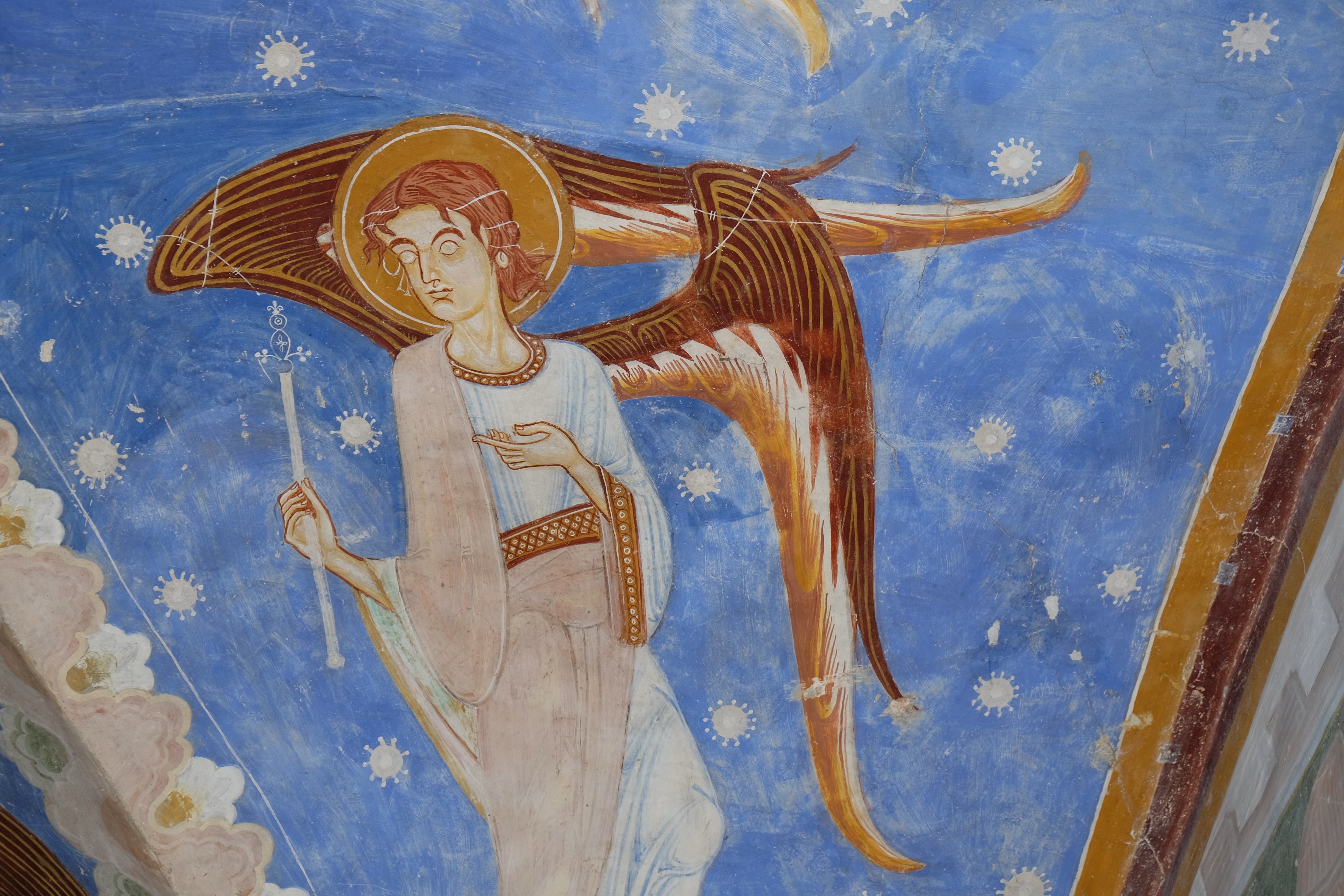 Krypta der Abtei Marienberg: Südlicher Engel der Westkappe mit reich entwickeltem Kreuzstab (Kreuz das blüht) als Hoheitszeichen, von Sonnen umgeben